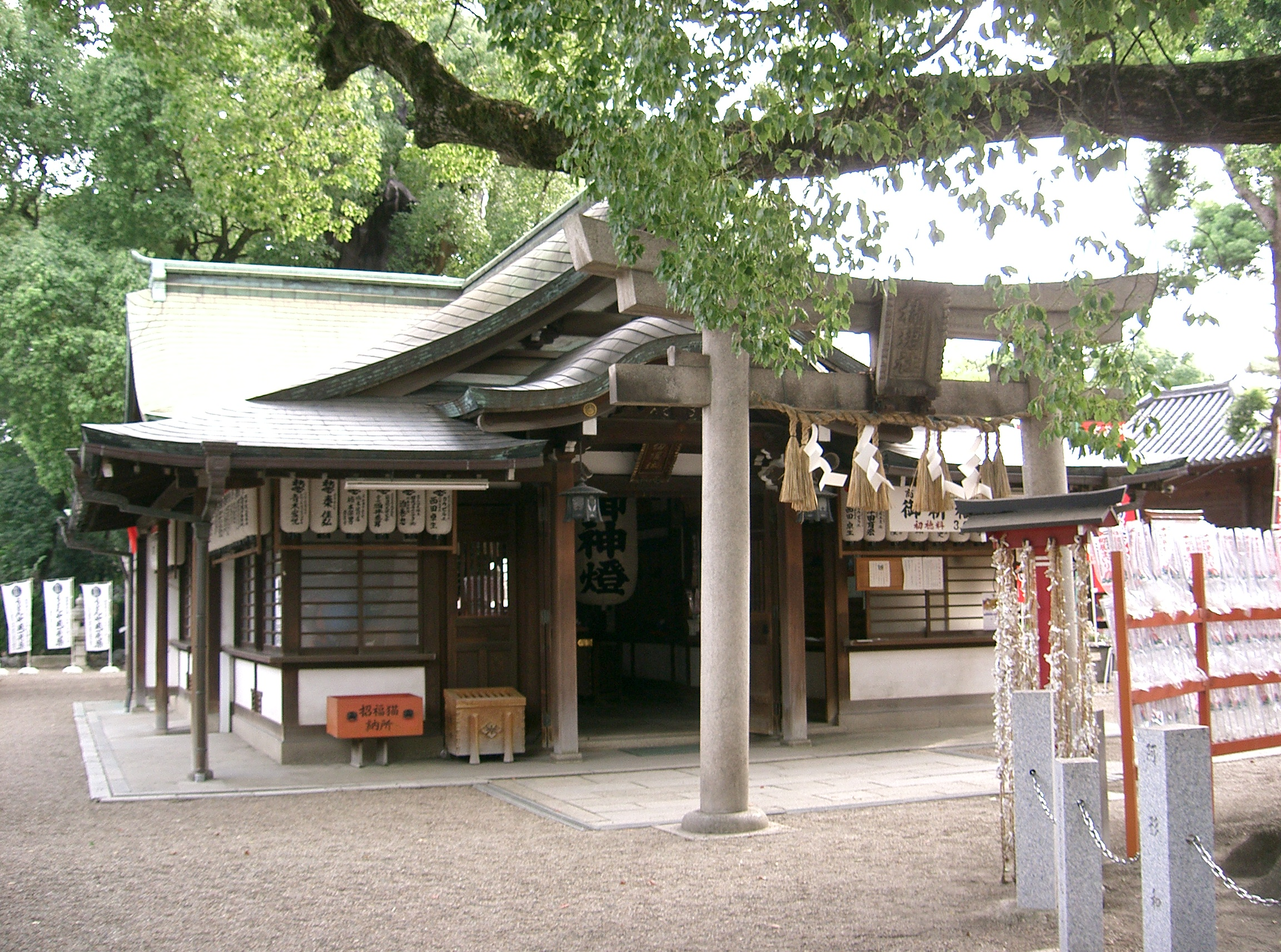 住吉大社 楠珺社